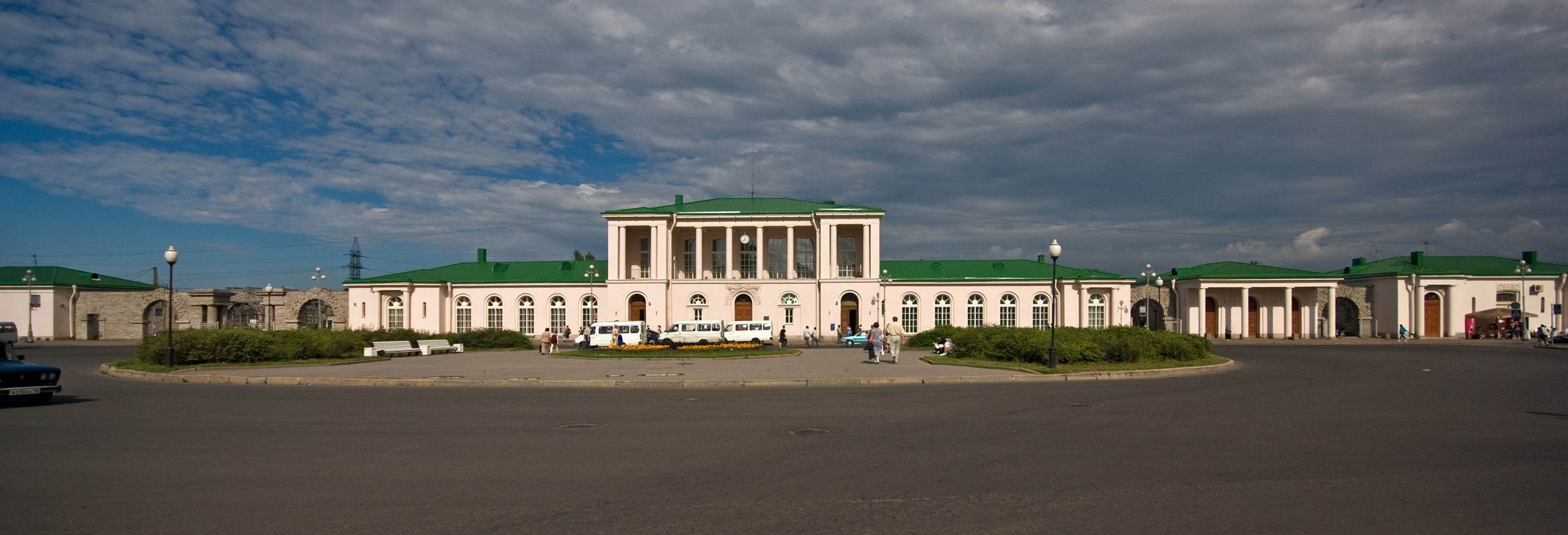 Здание вокзала жд станции Детское Село (г. Пушкин)